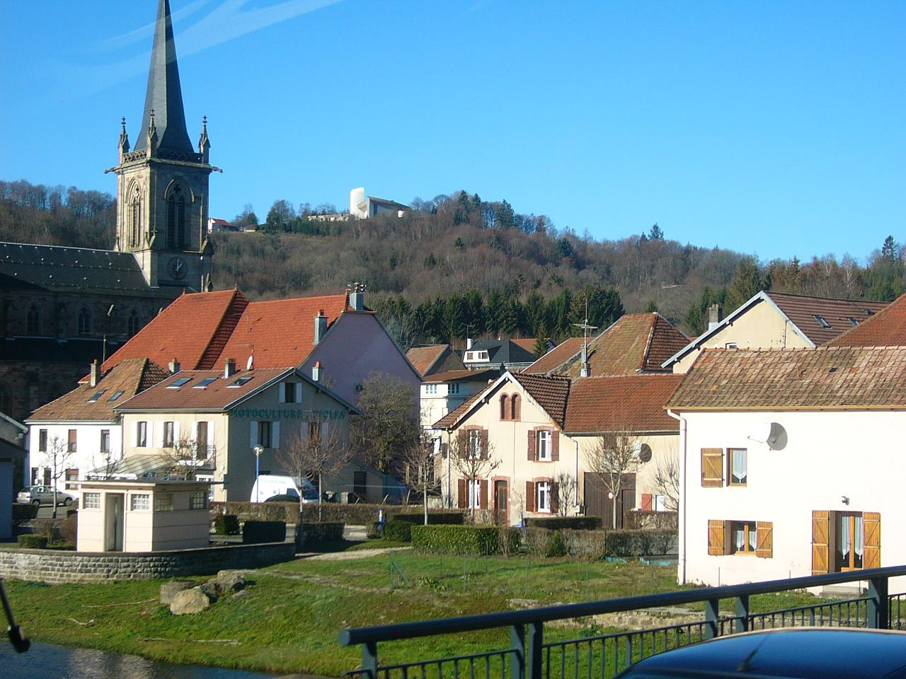 Le Corbusier - Notre Dame du Haut, Ronchamp, 1954